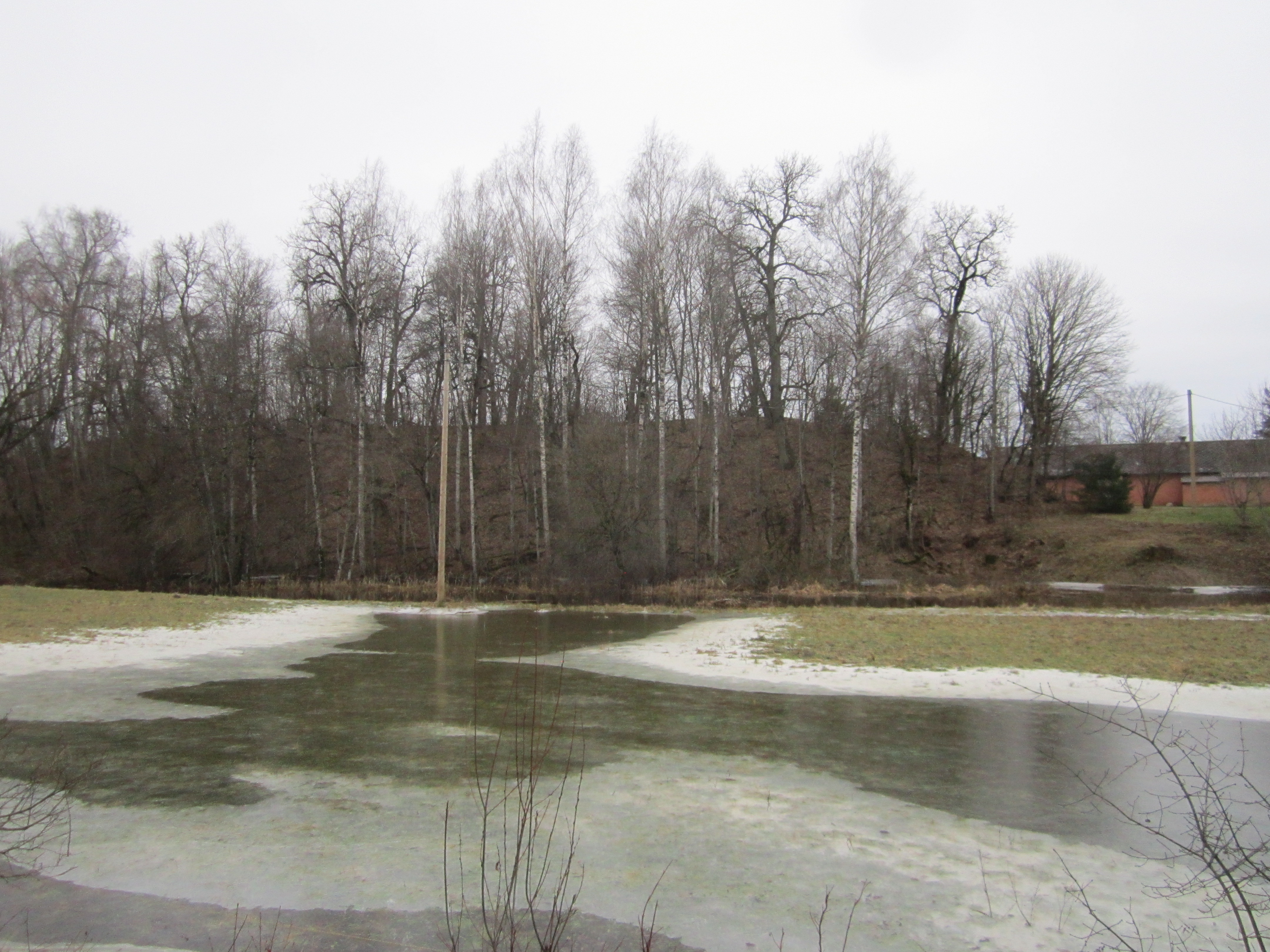 Annaskalns ziemas atkusnī